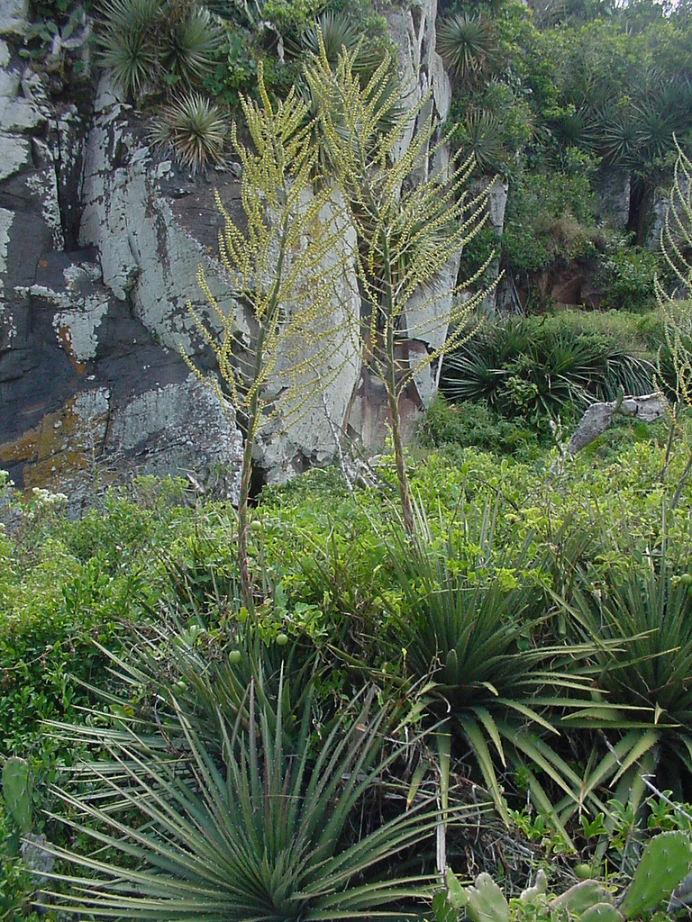 Dyckia maritima - BROMELIACEAE - Torres - RS - Brasil.